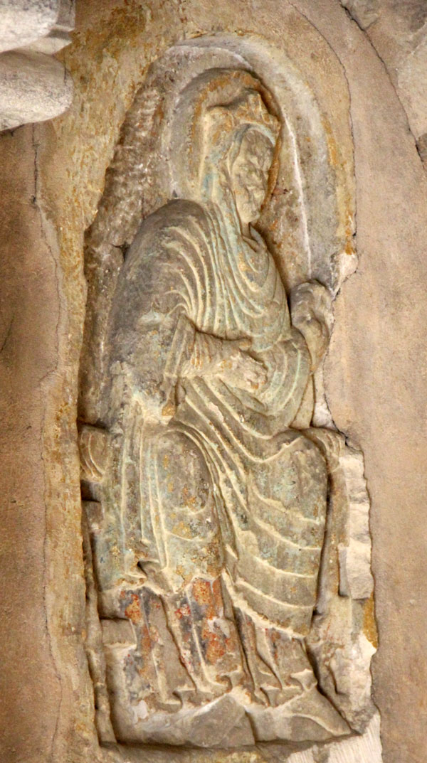 Relief de femme dans le porche de l'église Sainte-Radegonde à Poitiers.